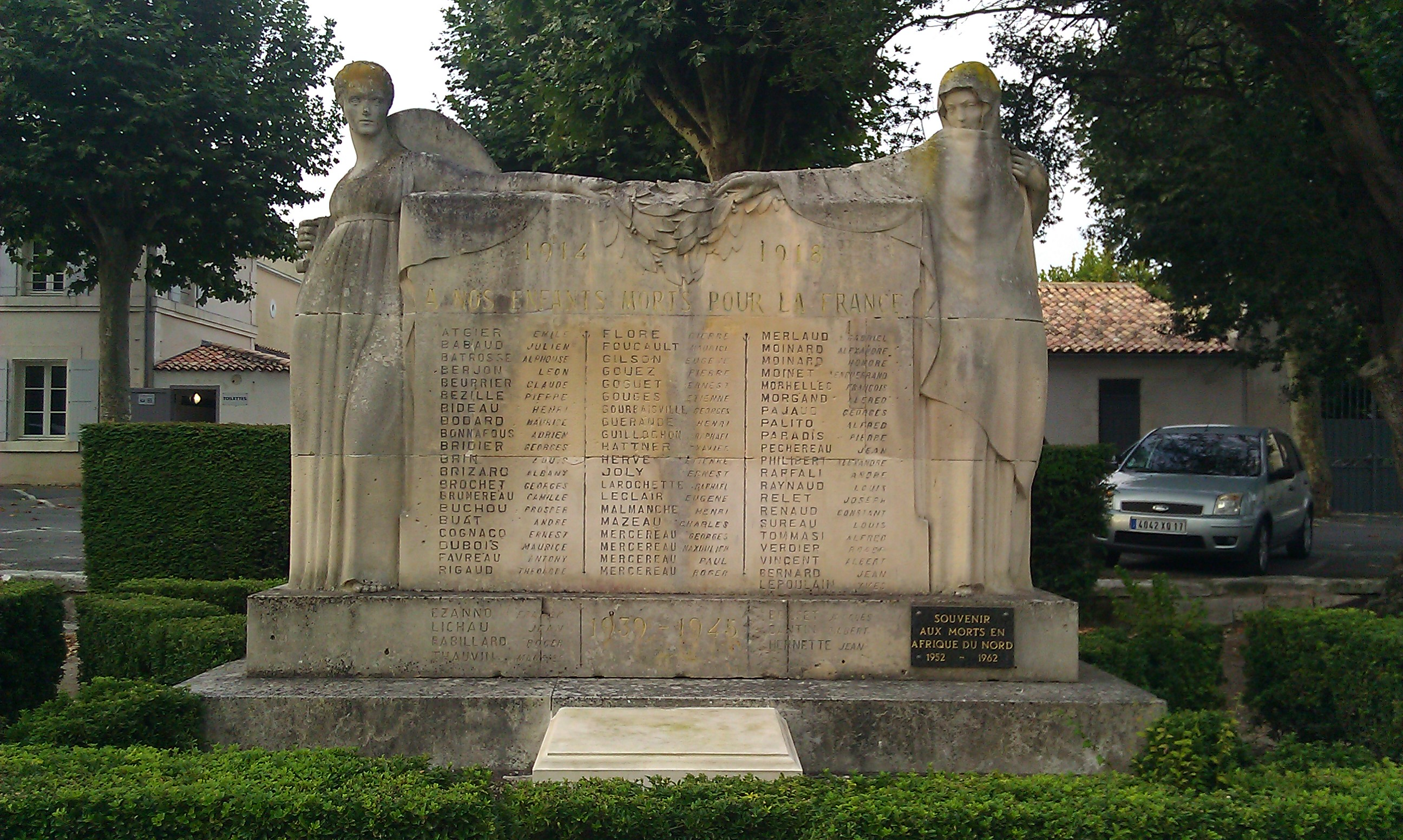 Monument aux morts de Saint-Martin de Ré, Île de Ré.